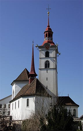 Stadtkirche St.Georg in Sursee